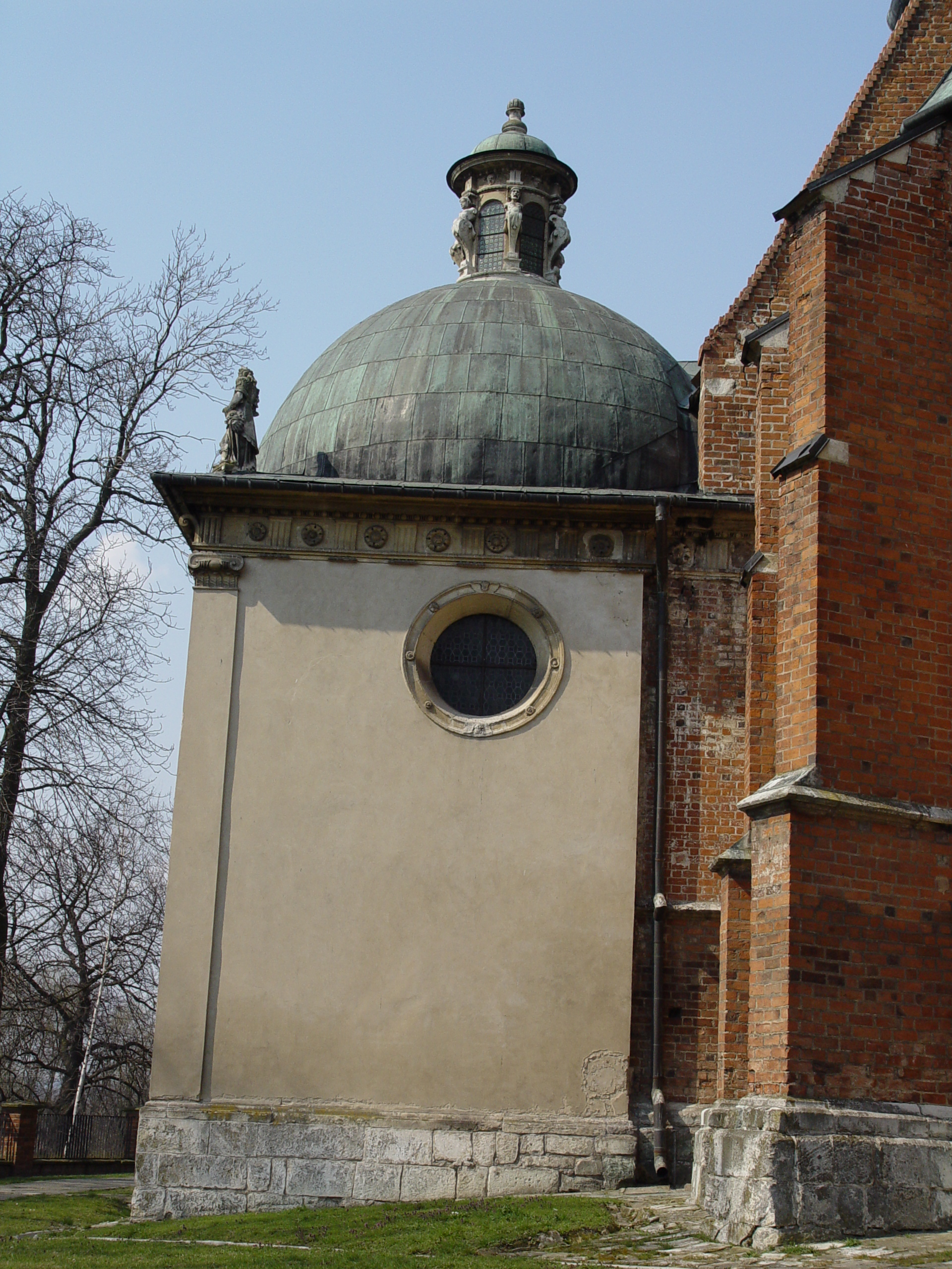 Bejsce, kościół par. pw. św. Mikołaja (z kaplicą Firlejów), kon. XIV, 1 poł. XVII w., 1883 r.; kaplica: lata 1594-1600